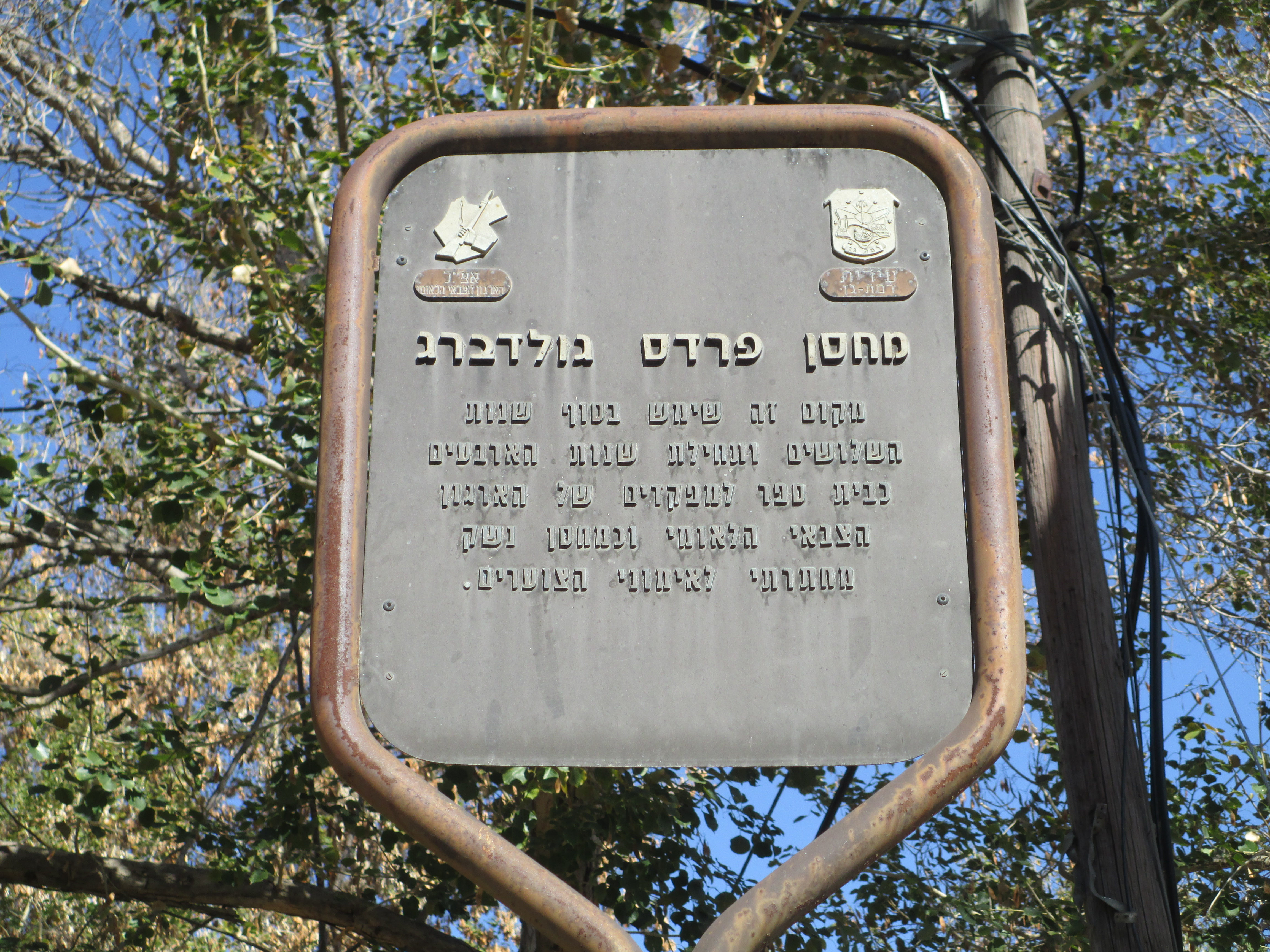 לוחית זיכרון לאצ"ל במקום בו היה מחסן פרדס גולדברג. כיום - שכונת עלית